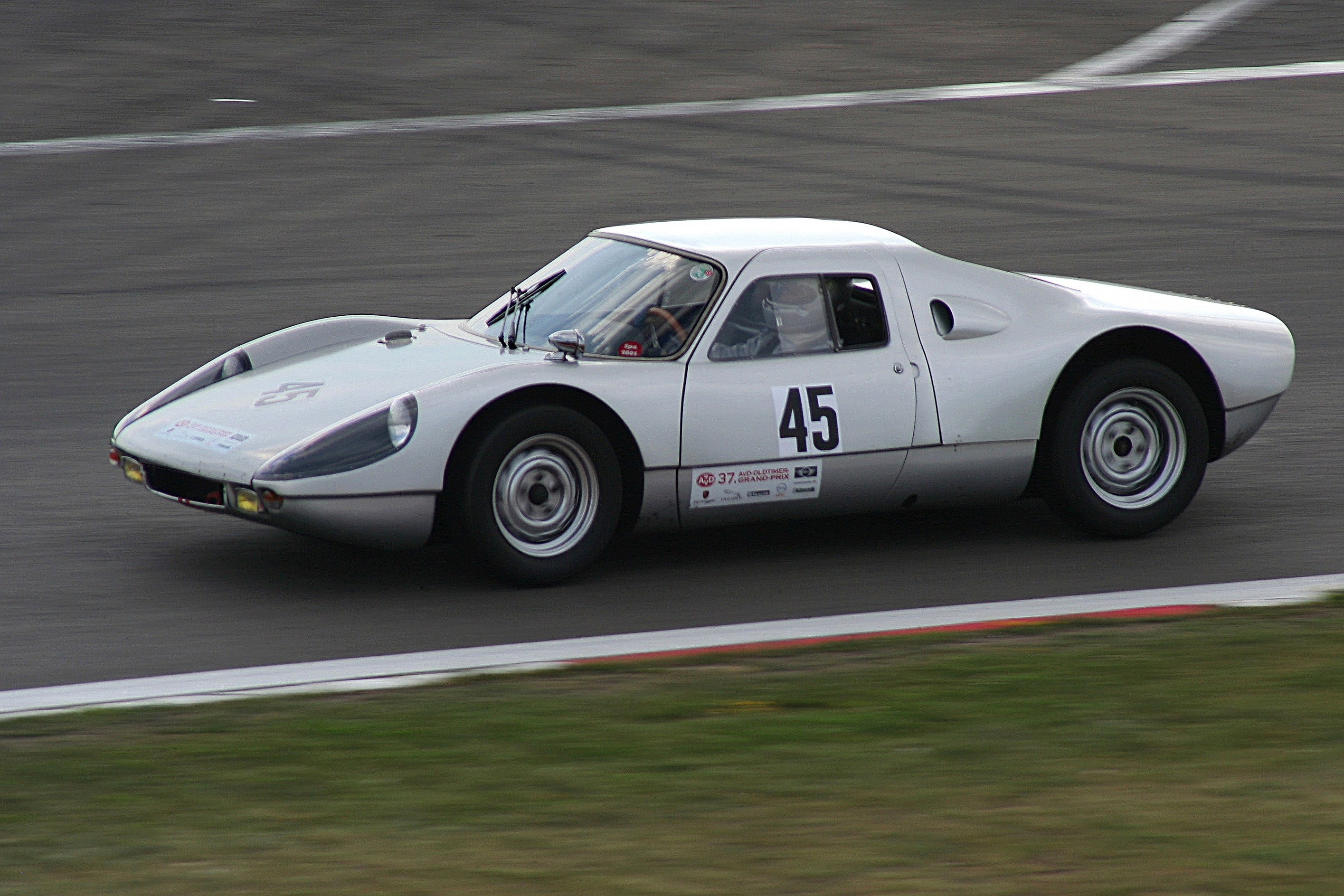 Porsche 904, Baujahr 1964, beim AvD-Oldtimer-Grand-Prix auf dem Nürburgring